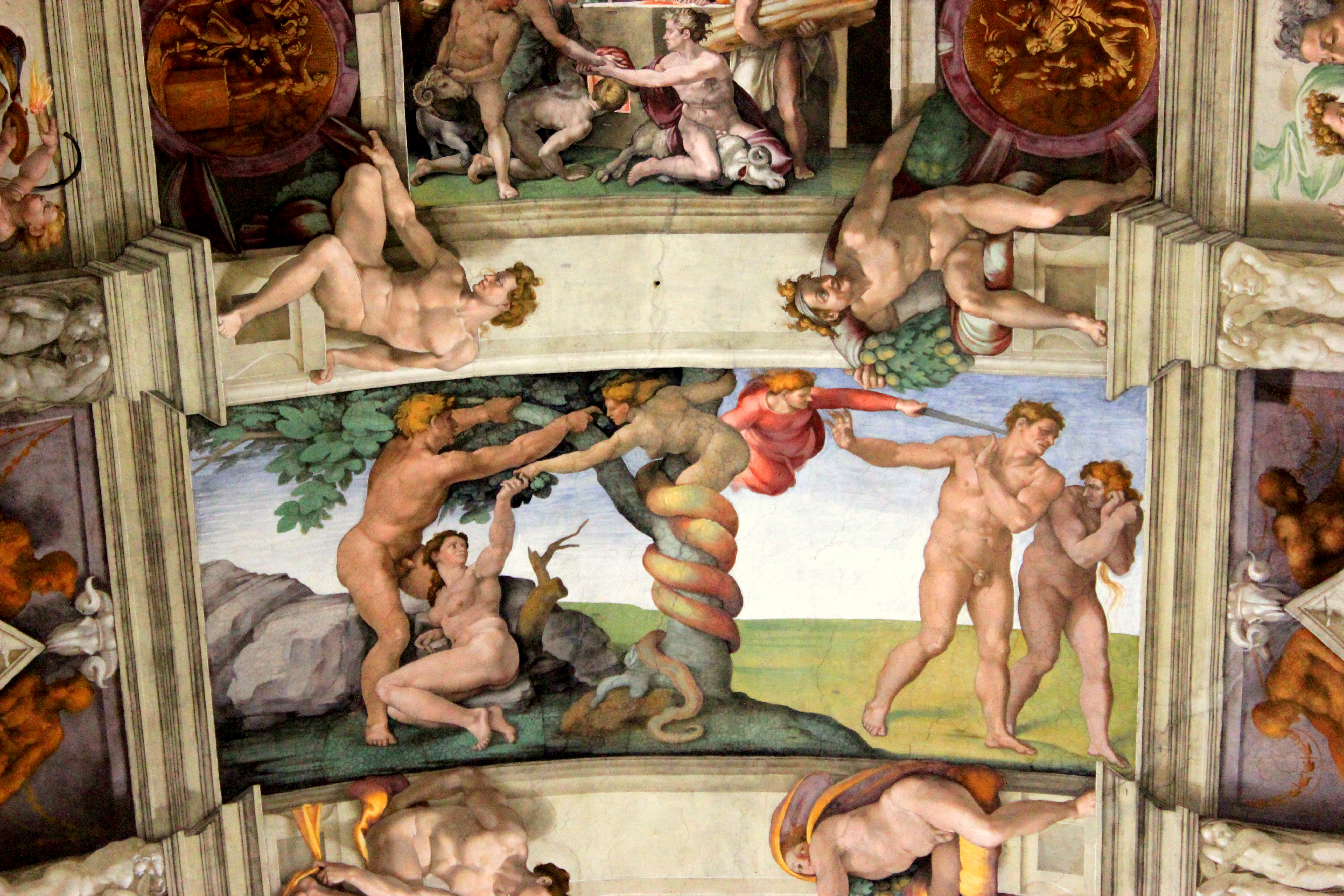 Pecado Original y Expulsión del Paraíso